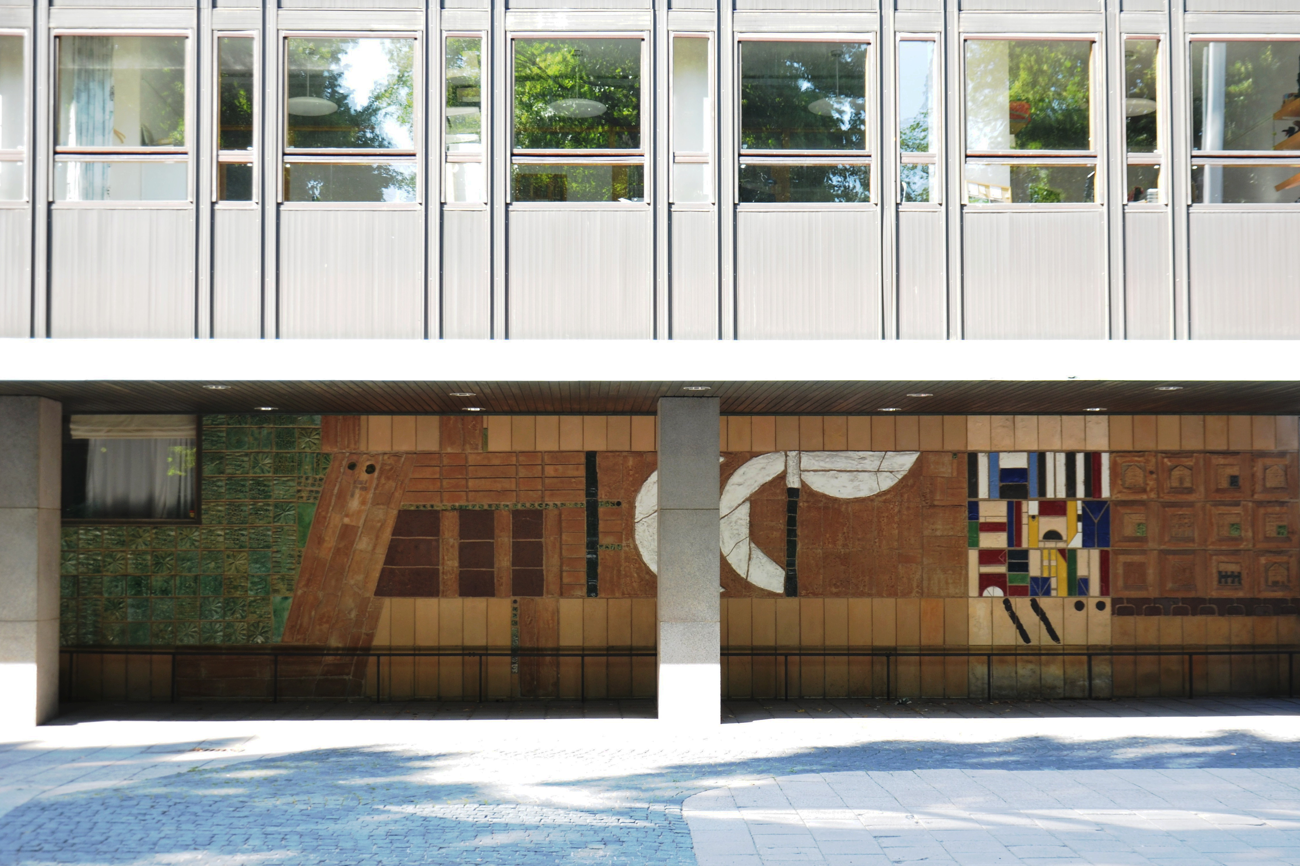 Signe Persson-Melin och Anders Liljefors: Mosaikrelief på tidigare Skogsindustrihuset på Karlavägen 31 i Stockholm